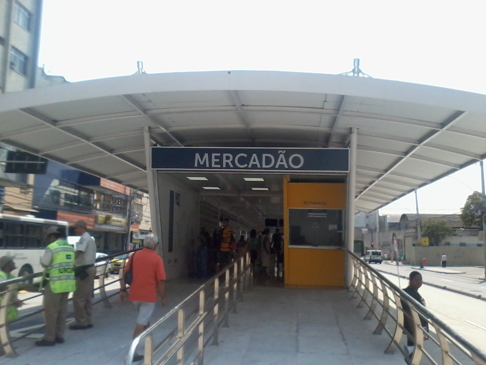 Estação Mercadão, entrada em frente ao Mercadão de Madureira e a Rua Alves